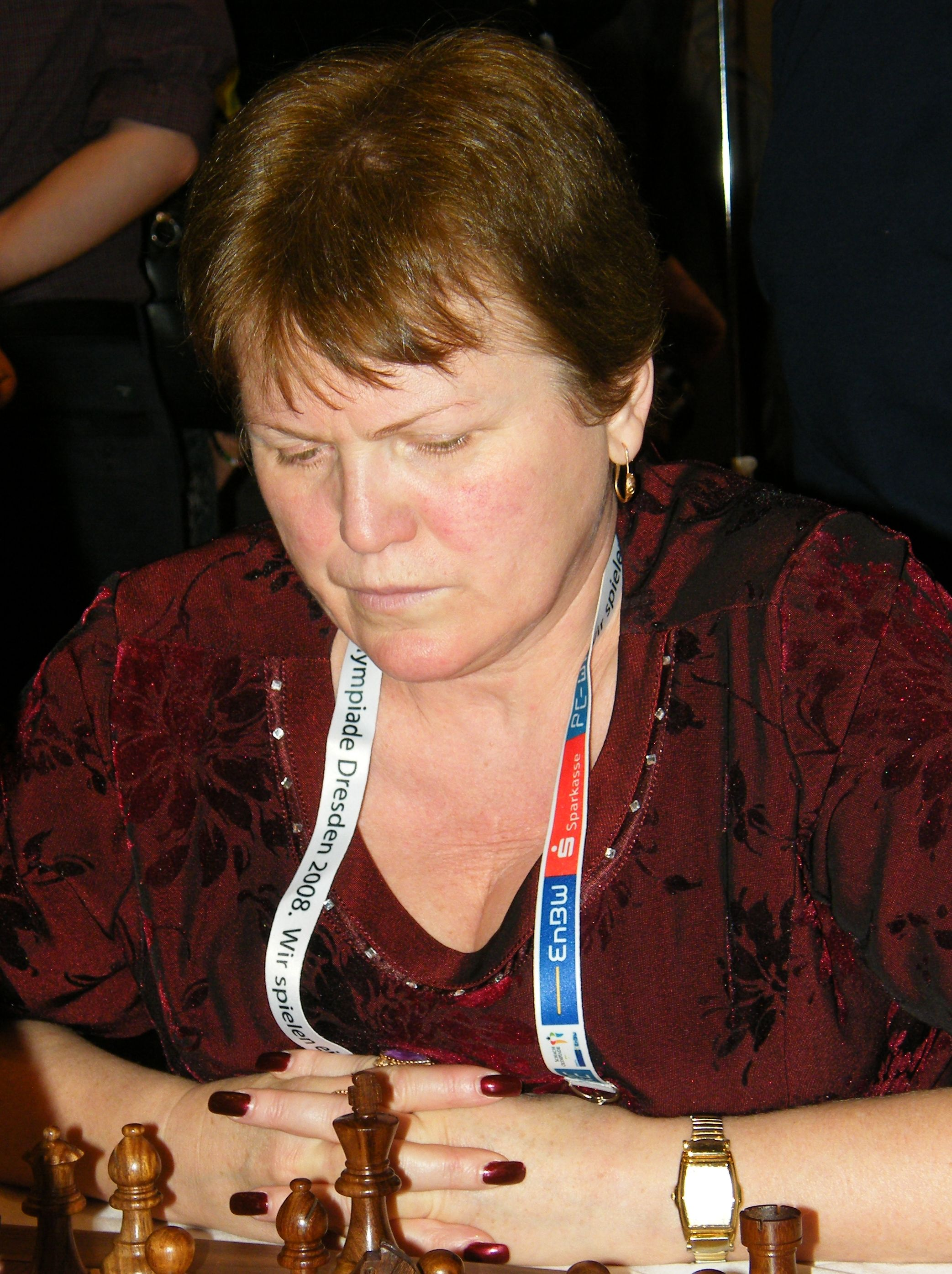 WIM Lubov Zsiltzova-Lisenko bei der 38. Schacholympiade in Dresden 2008